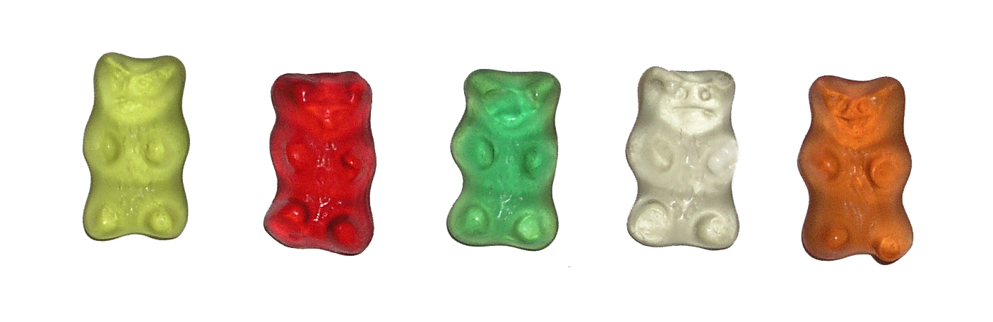 Haribo, Goldbären